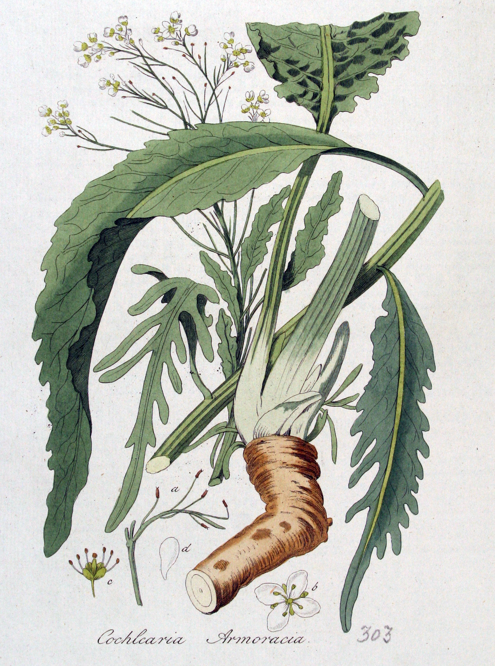 Armoracia rusticana P. Gaertn., B. Mey. & Scherb. (Syn. Cochlearia armoracia L.)